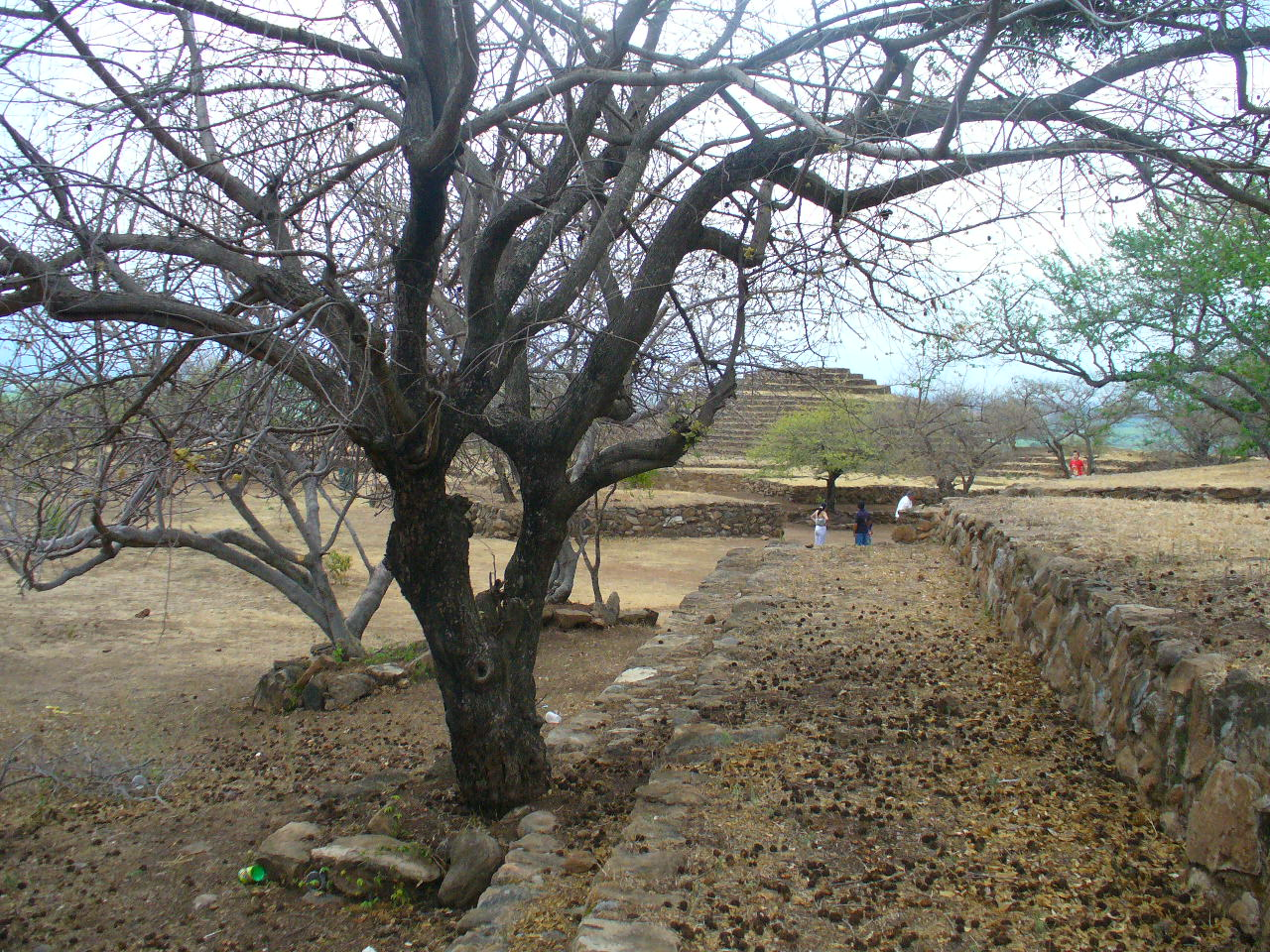 Imagen de los Guachimontones, Teuchitlàn, Jalisco, Mèxico.